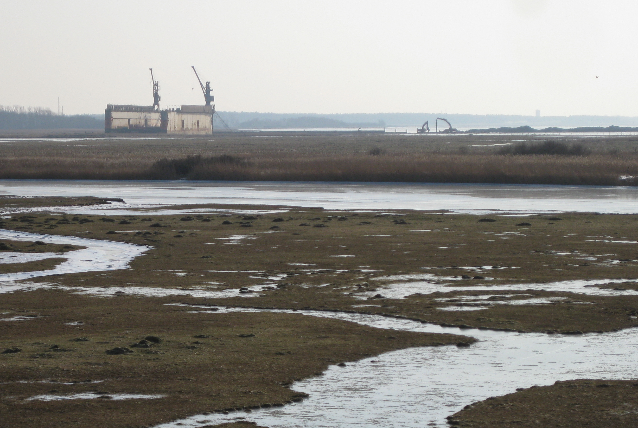 Bärgning av torrdockan från Landskrona som slet sig vid Adventsstormen 2011